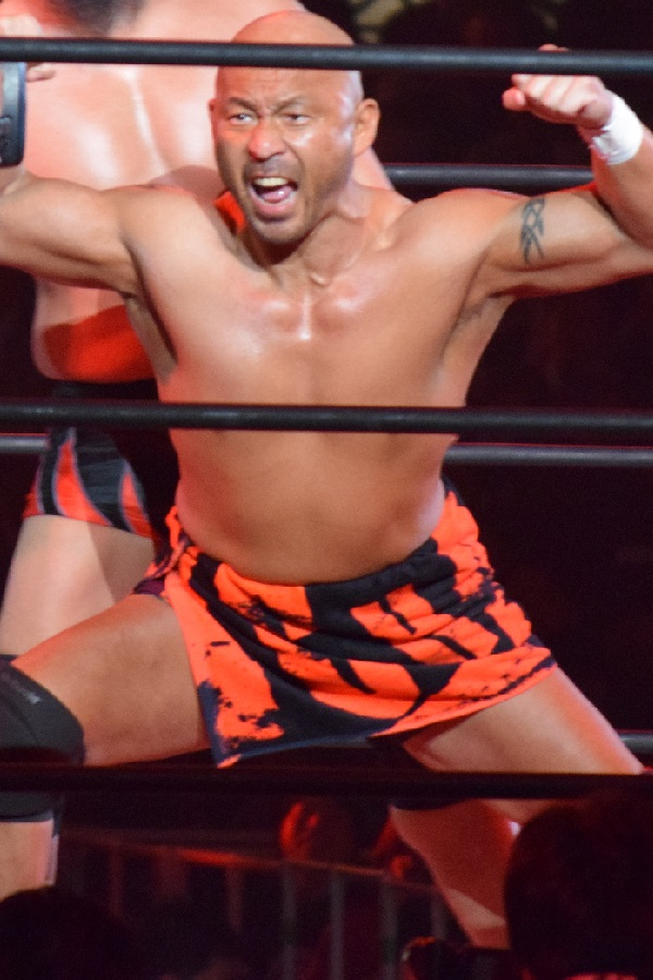 2017年2月11日 大阪府立体育会館 「THE NEW BEGINNING in OSAKA」 邪道